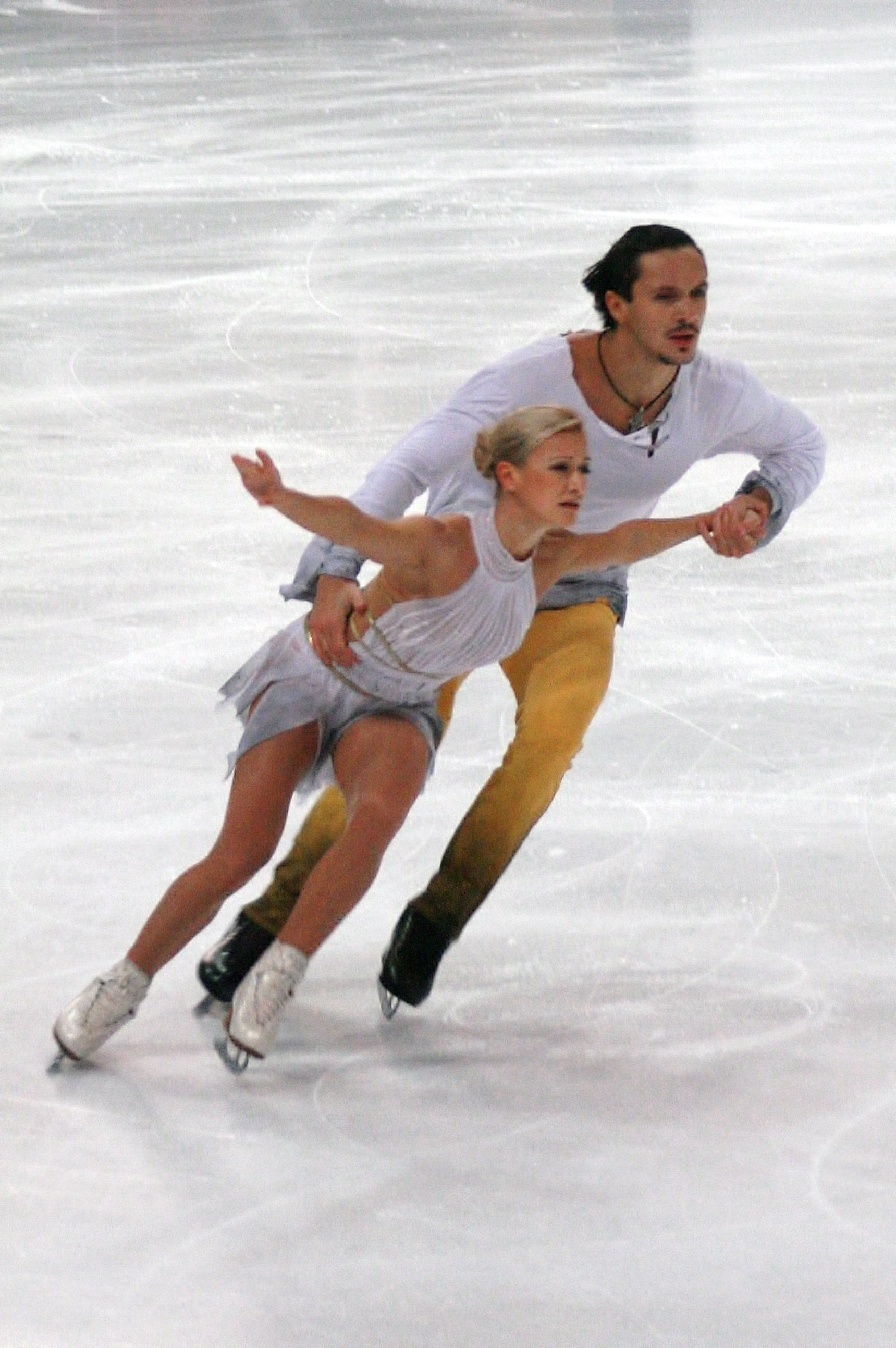 Татьяна Волосожар и Максим Траньков (Россия) на 2013 Nebelhorn Trophy.